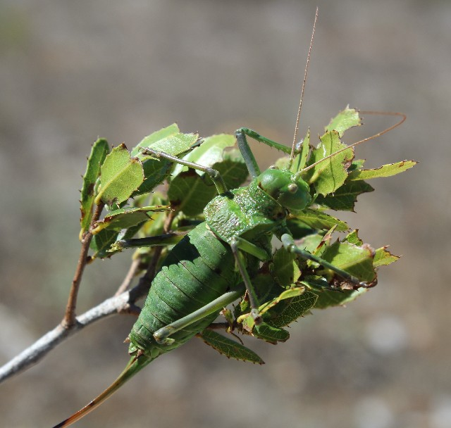 Neocallicrania selligera meridionalis